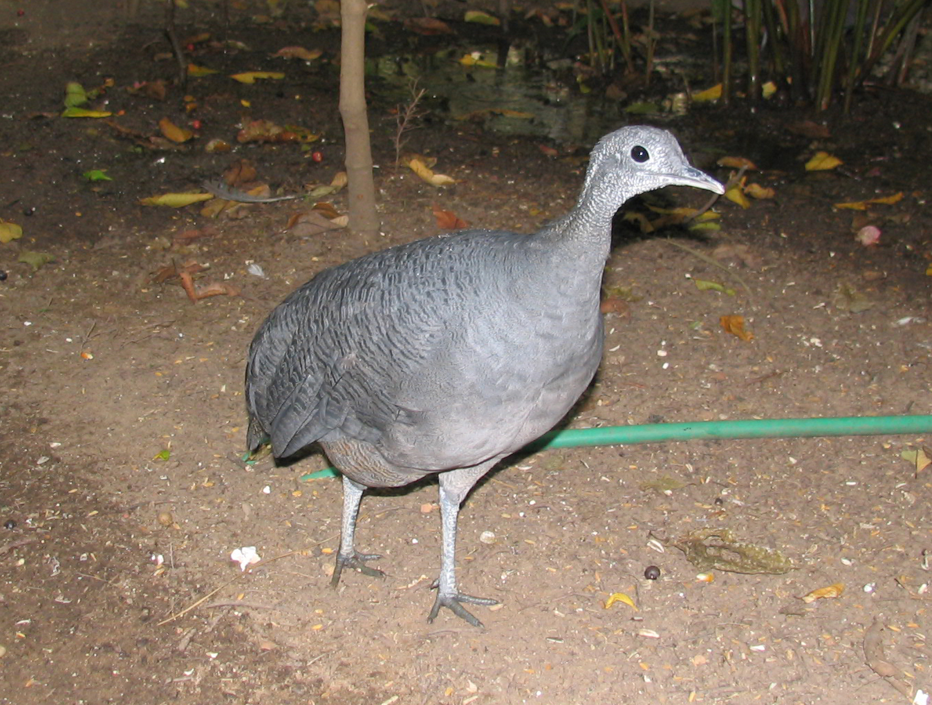 Tinamus tao, vulgarmente conhecida como Azulona Edited version